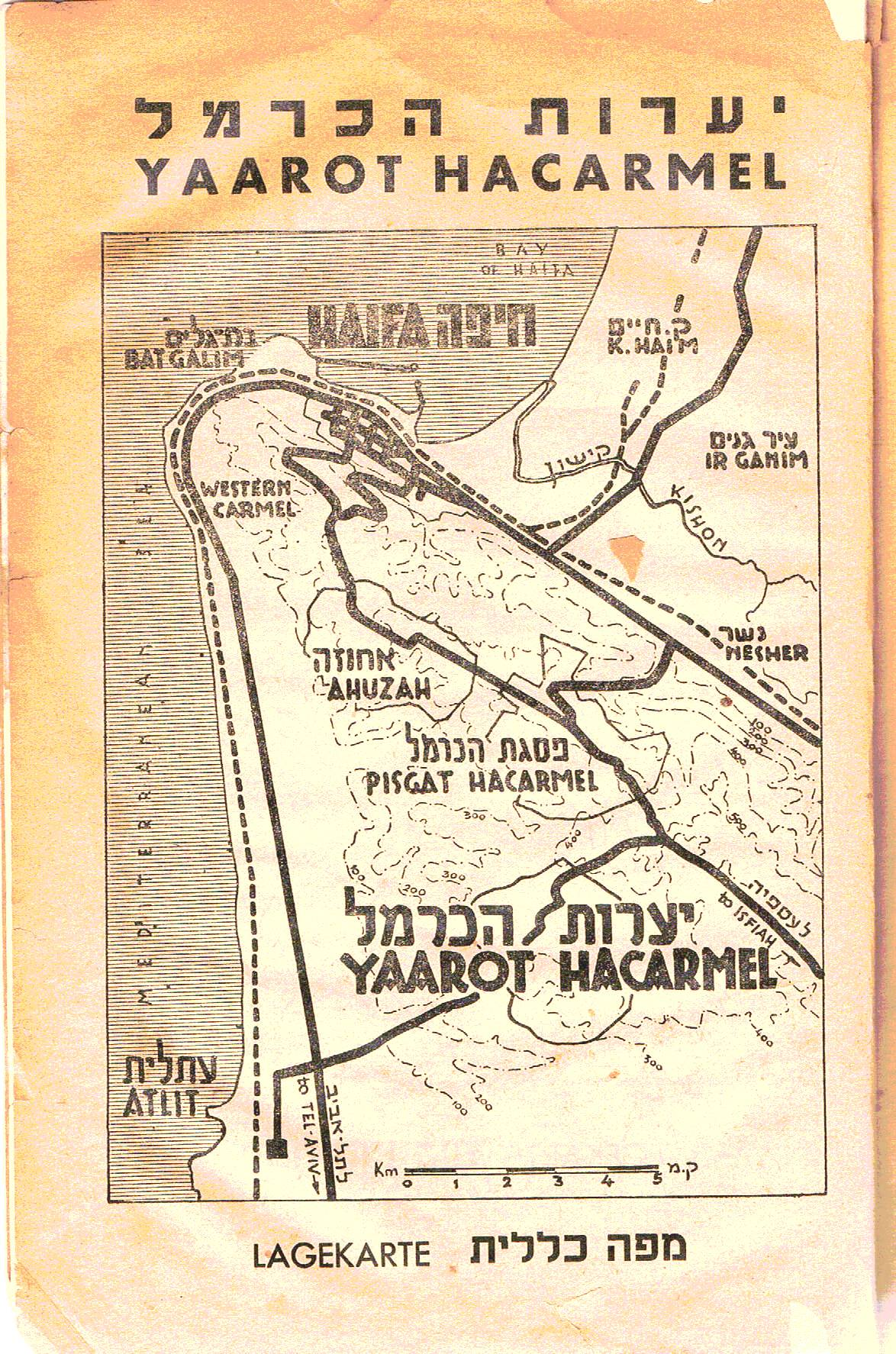 Yaarot Hacarmel Settlers Assocatoin Ltd brochure חוברת הפרסום של תכנית יערות הכרמל להקמת יישוב בהר הכרמל באזור חוות משמר הכרמל, גבעת וולפסון קיבוץ בית אורן של היום. פעילות שהחלה בשנות השלושים של המאה העשרים. החוברת כללה פרסום בעברית ובגרמנית